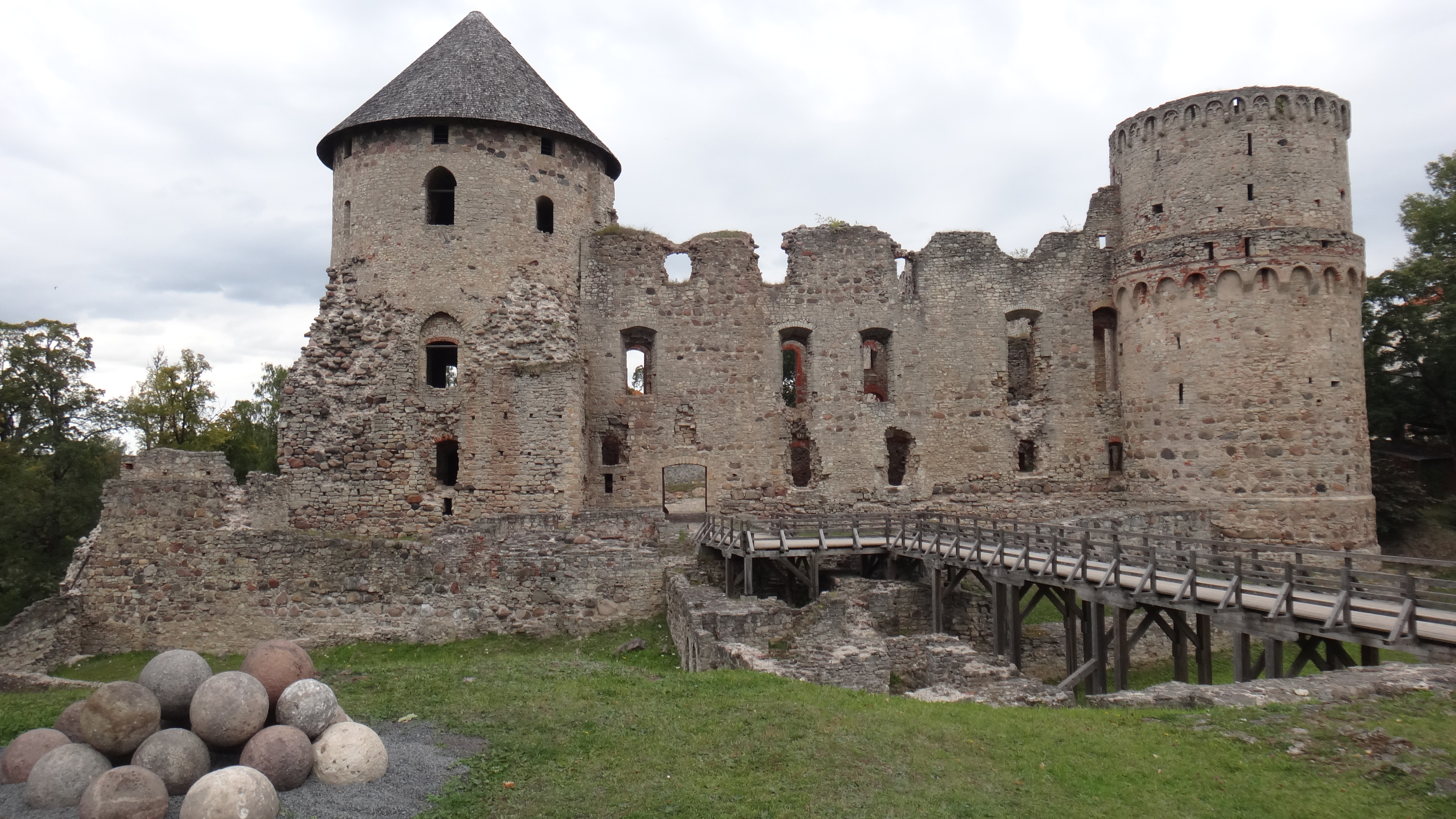 Cēsis, Cēsu pilsēta, Latvia